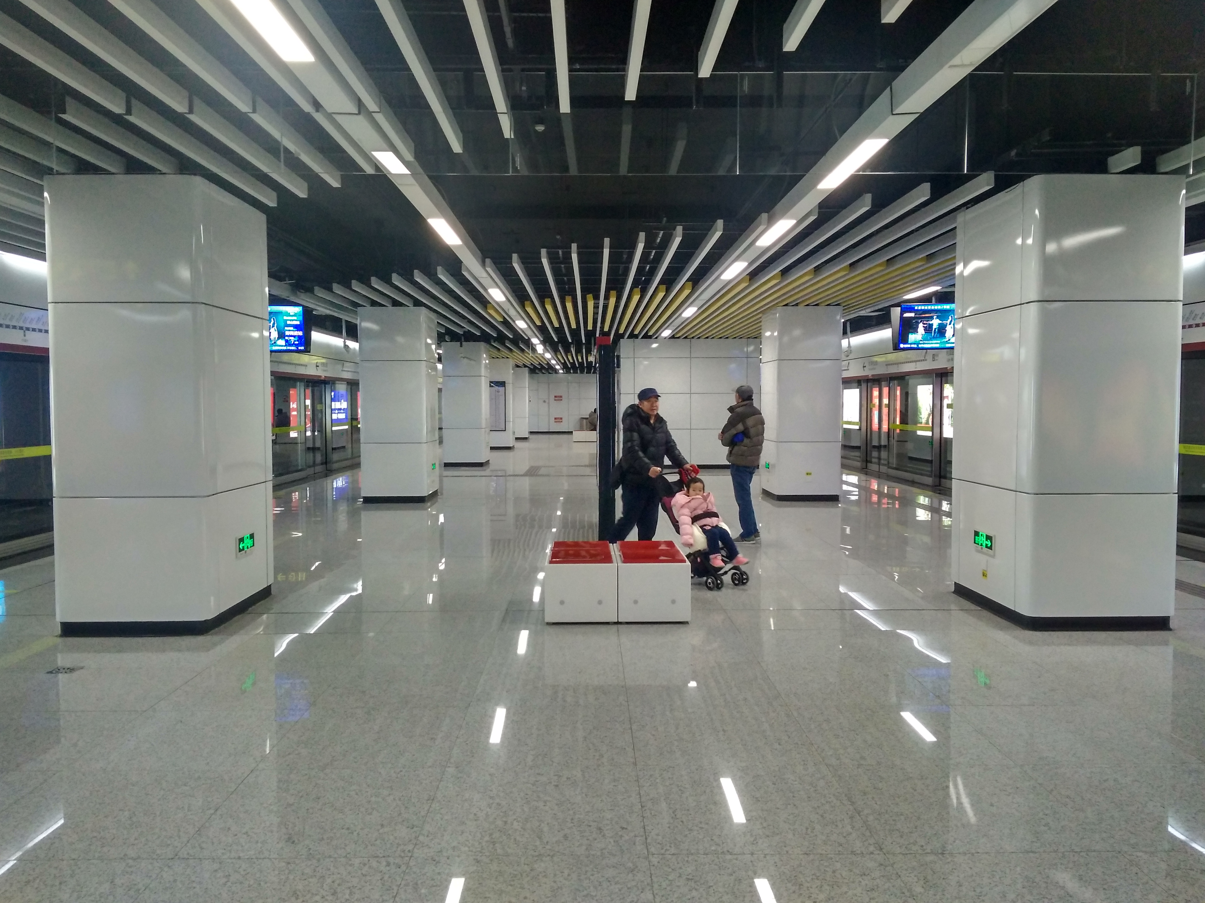 中文（中国大陆）: 青岛地铁2号线利津路站站台